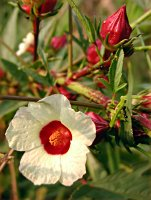 Flower: Hibiscus sabdariffa Linn (กระเจี๊ยบแดง)/Photo taken by User:Loma